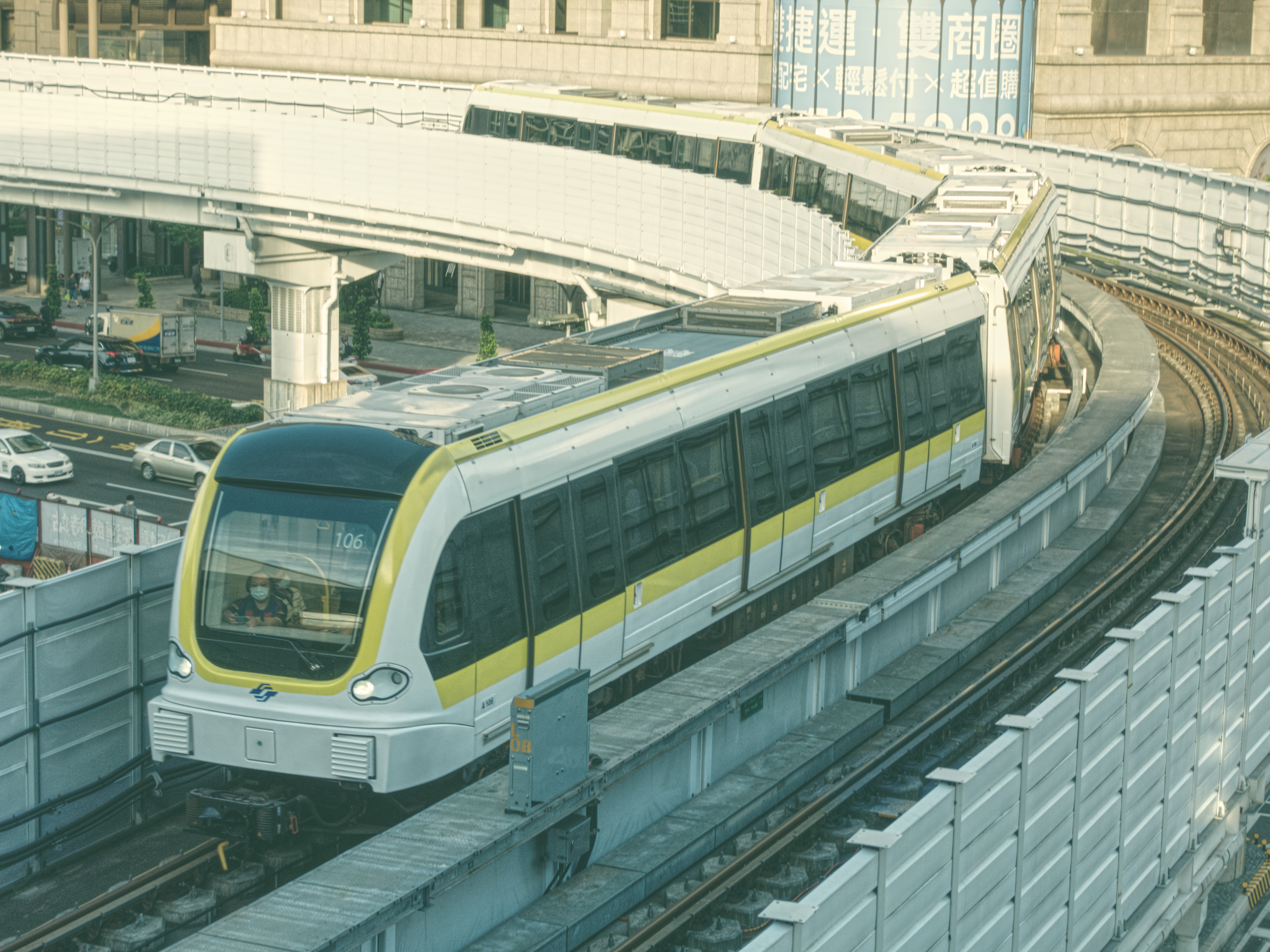 aDSC05516